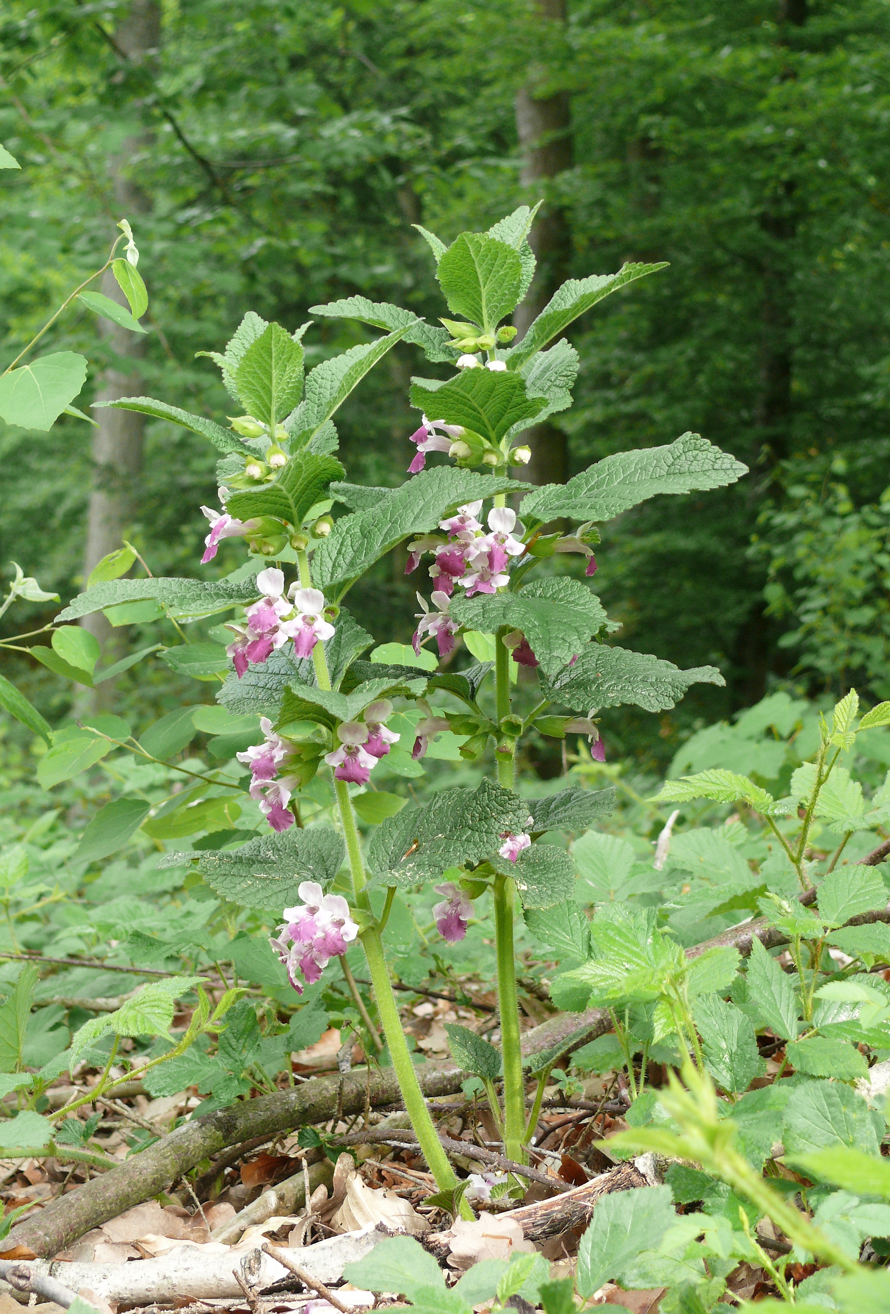 Melittis melissophyllum Deutschland - Schwäbisch-Fränkische Waldberge